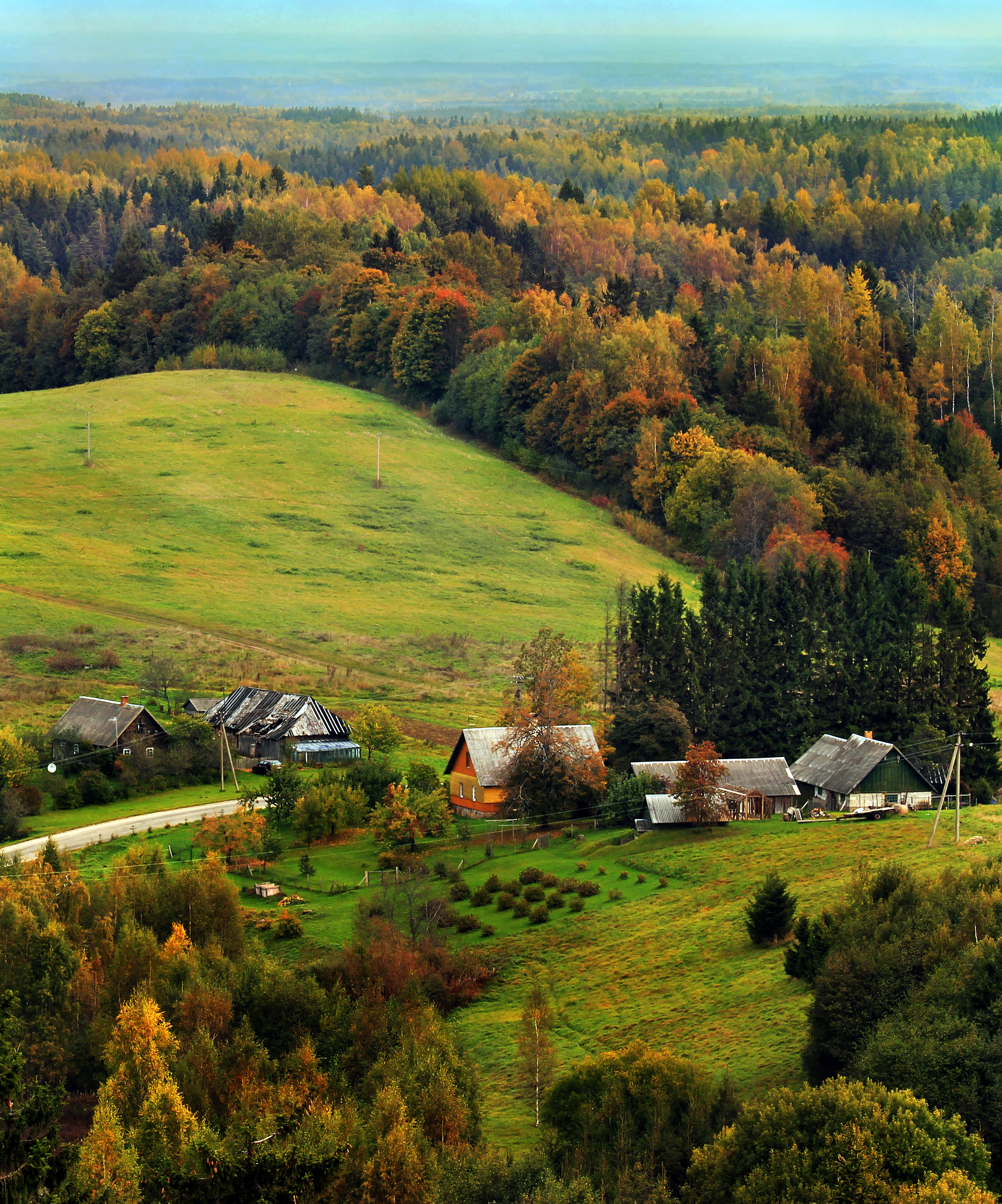 Haanja küla